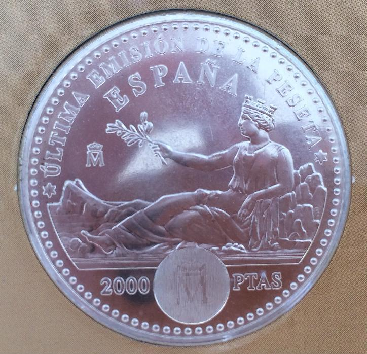 Última moneda de 2000 pesetas acuñada en España.